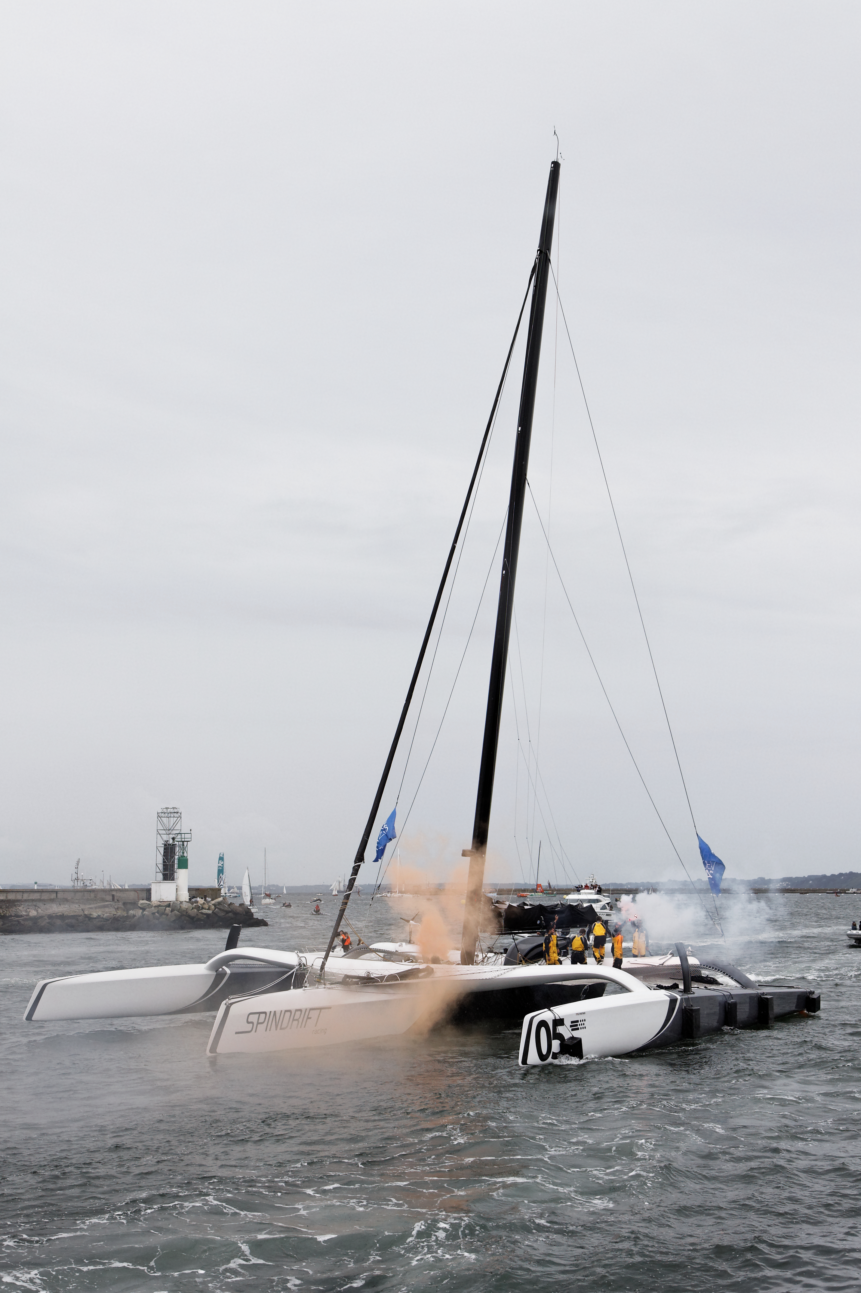 L'équipage du Spindrift Racing saluant la foule lors de son entrée dans le port de Brest lors des Tonnerres de Brest 2012, le 13 juillet 2012.